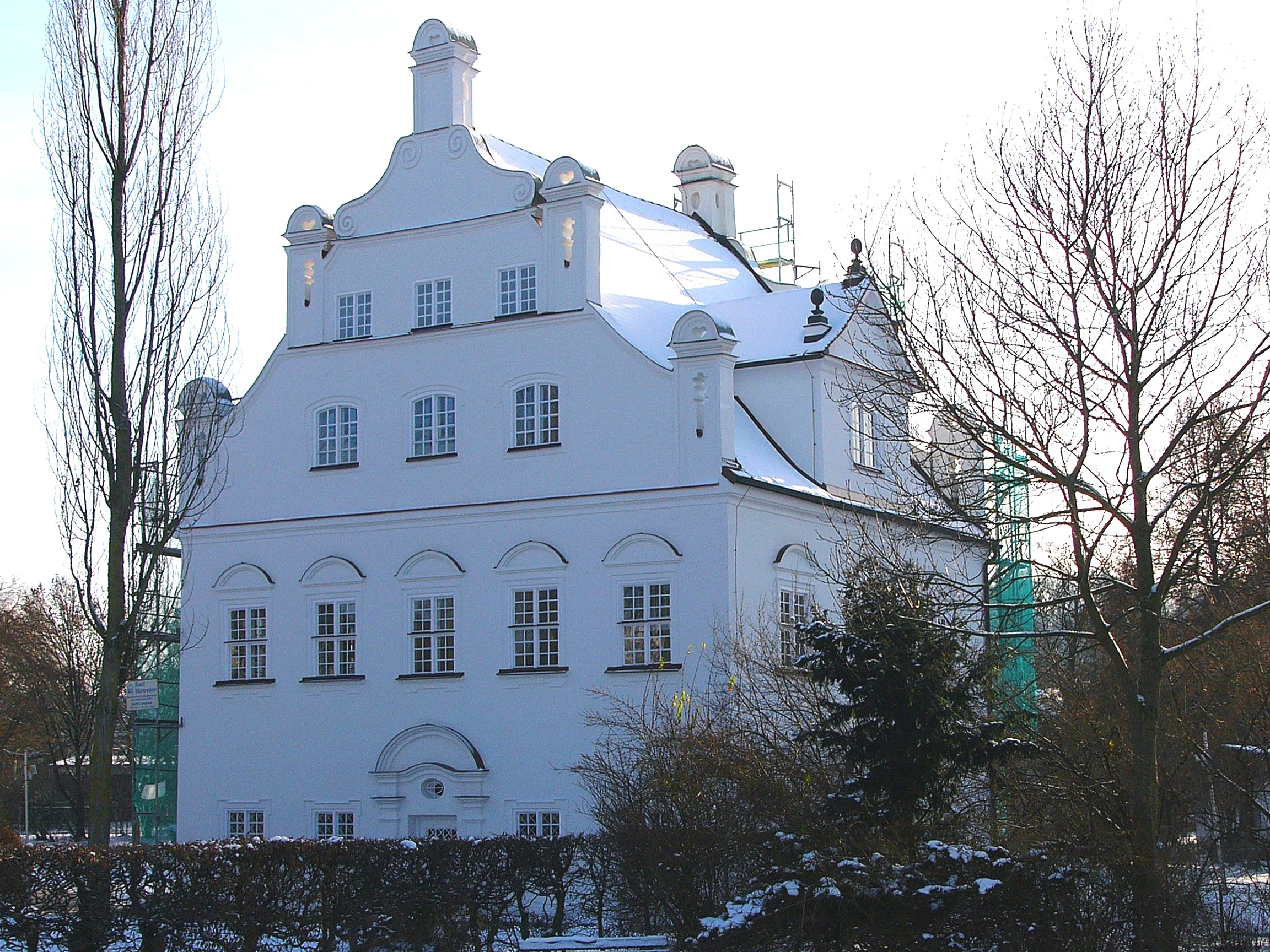 Ruffinischlösschen, freistehender zweigeschossiger Bau mit Ziergiebeln, wohl 2. Hälfte 17. Jh.This is a photograph of an architectural monument.